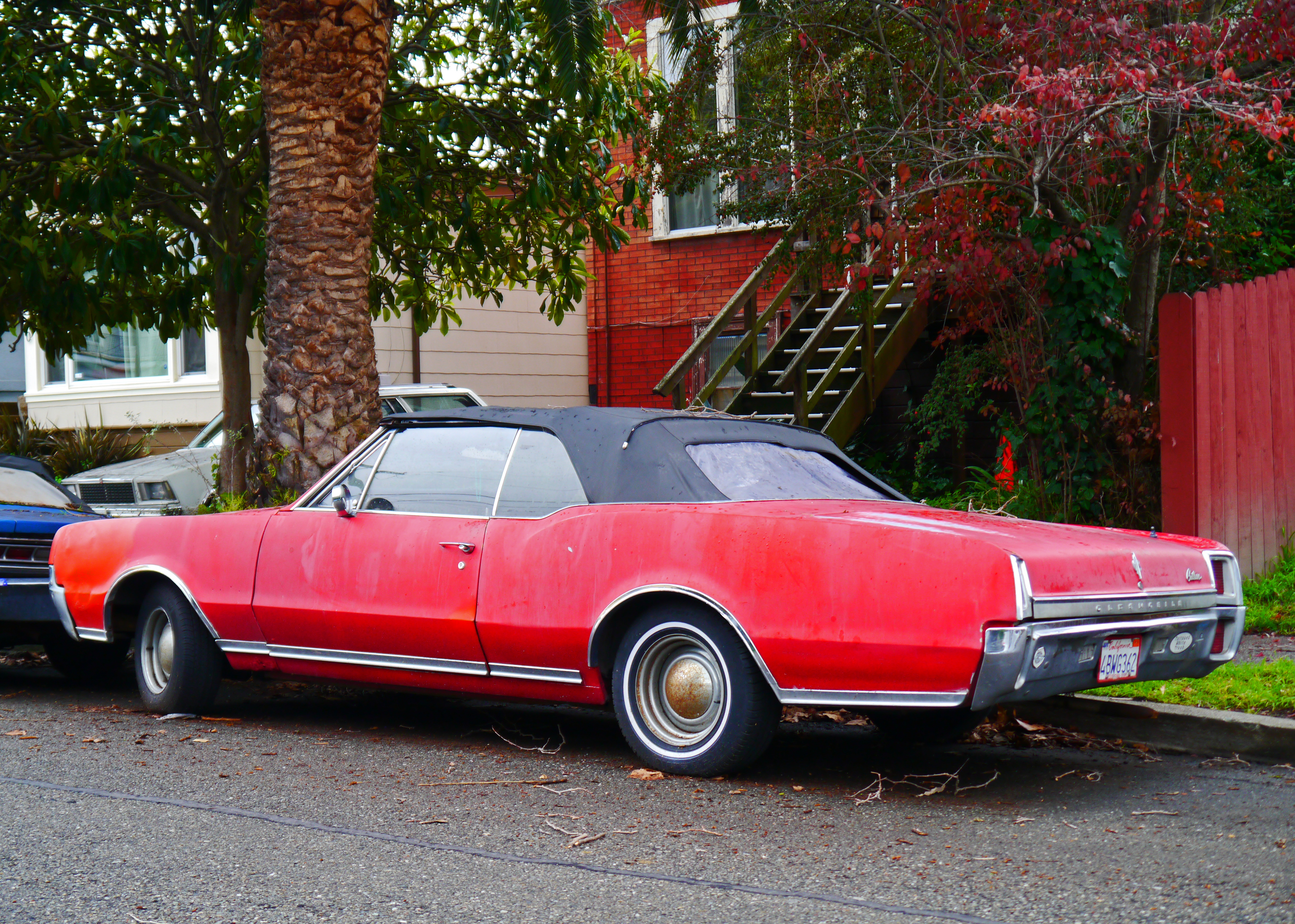 1967 Oldsmobile Cutlass Supreme convertible.